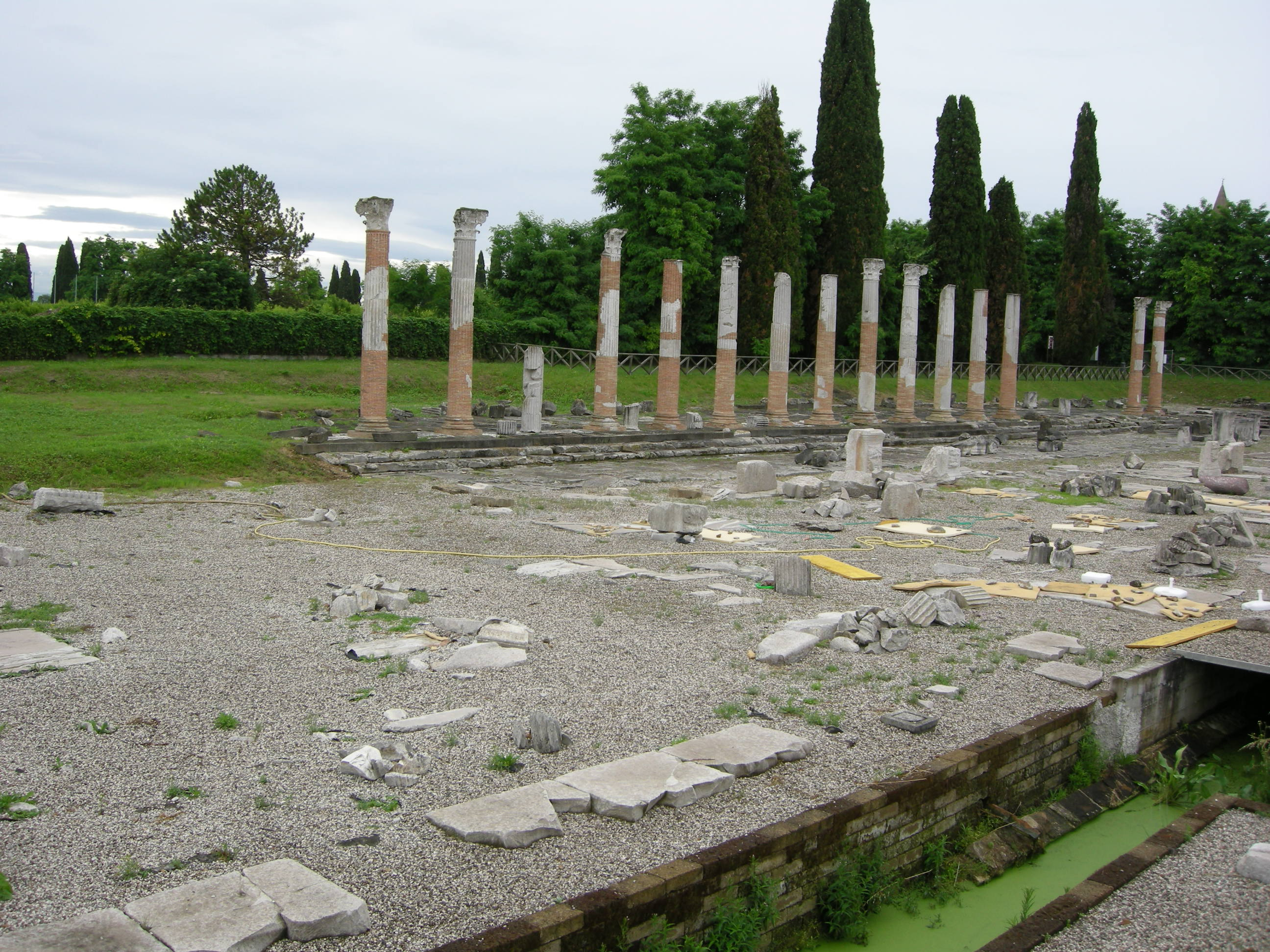 Le rovine del Foro romano di Aquileia, nell'area degli scavi archeologici.